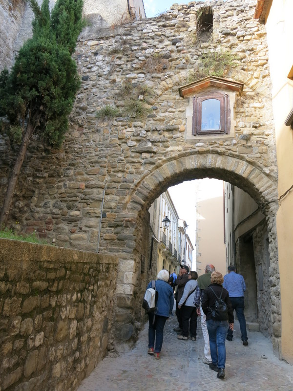 Portal de la Força a Besalú a la Comarca de la Garrotxa - Catalunya